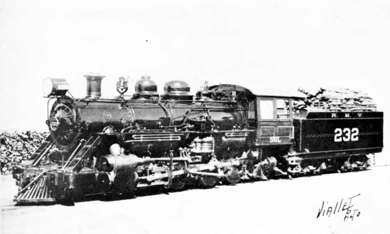 Mostra um exemplar de locomotiva utilizada para vencer as rampas da Serra da Mantiqueira entre Cruzeiro-SP e Passa Quatro-MG.